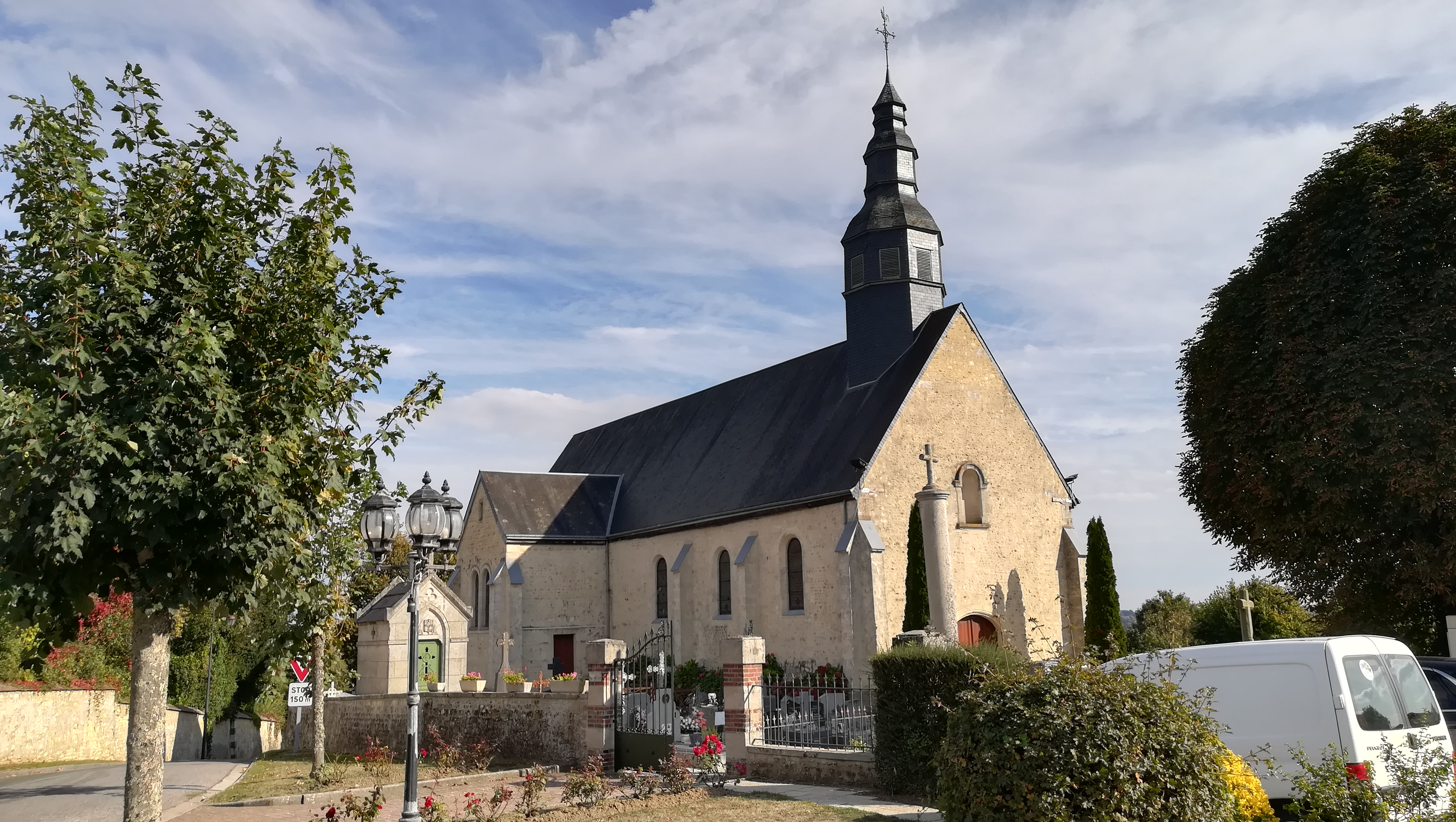 Église de Coulonges-sur-Sarthe, dans l'Orne